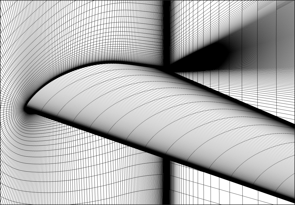 Grid System of 3-D Wing near Wing Root